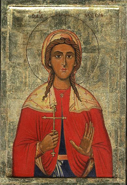 Св. Неделя Kyriaki (martyr)